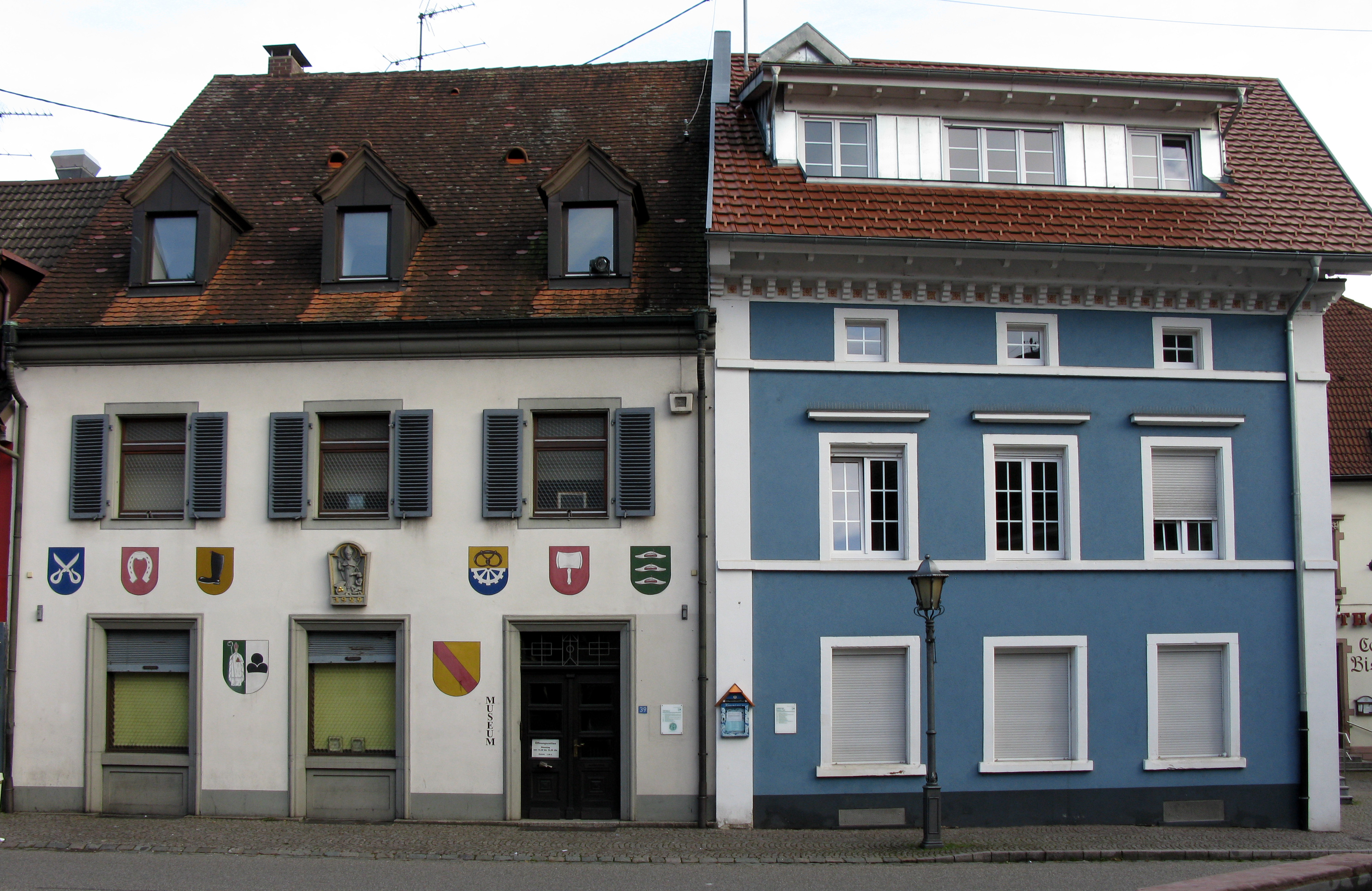 Elzach, links Altes Rathaus, 1650 Wiederherstellung nach Zerstörung im Dreißigjährigen Krieg. Das Arkadengewölbe des Erdgeschosses diente als Gerichts- und Marktstätte. 1804 Renovierung nach Ruinierung durch durchziehende Truppen, bis 1909 Rathaus von Elzach dann bis 1965 Verwaltungsgebäude der 1873 gegründeten Sparkasse, 1929 Neugestaltung der Fassade. Seit 1967 Heimatmuseum der Stadt. rechts Gasthof Hirschen-Post (Tafel Inschrift)